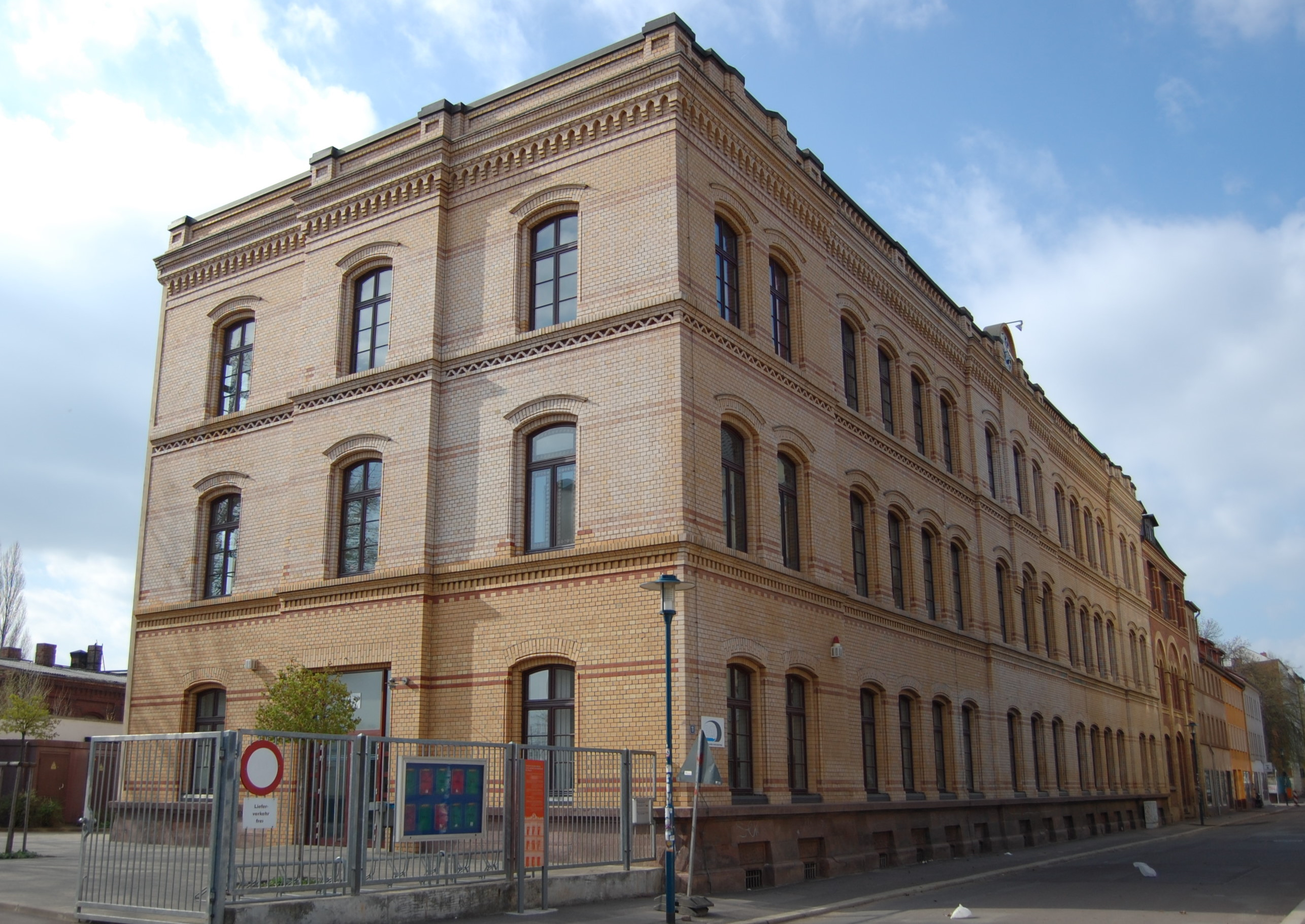 Gebäude der Firma Rudolf Wolf in Buckau, Karl-Schmidt-Straße